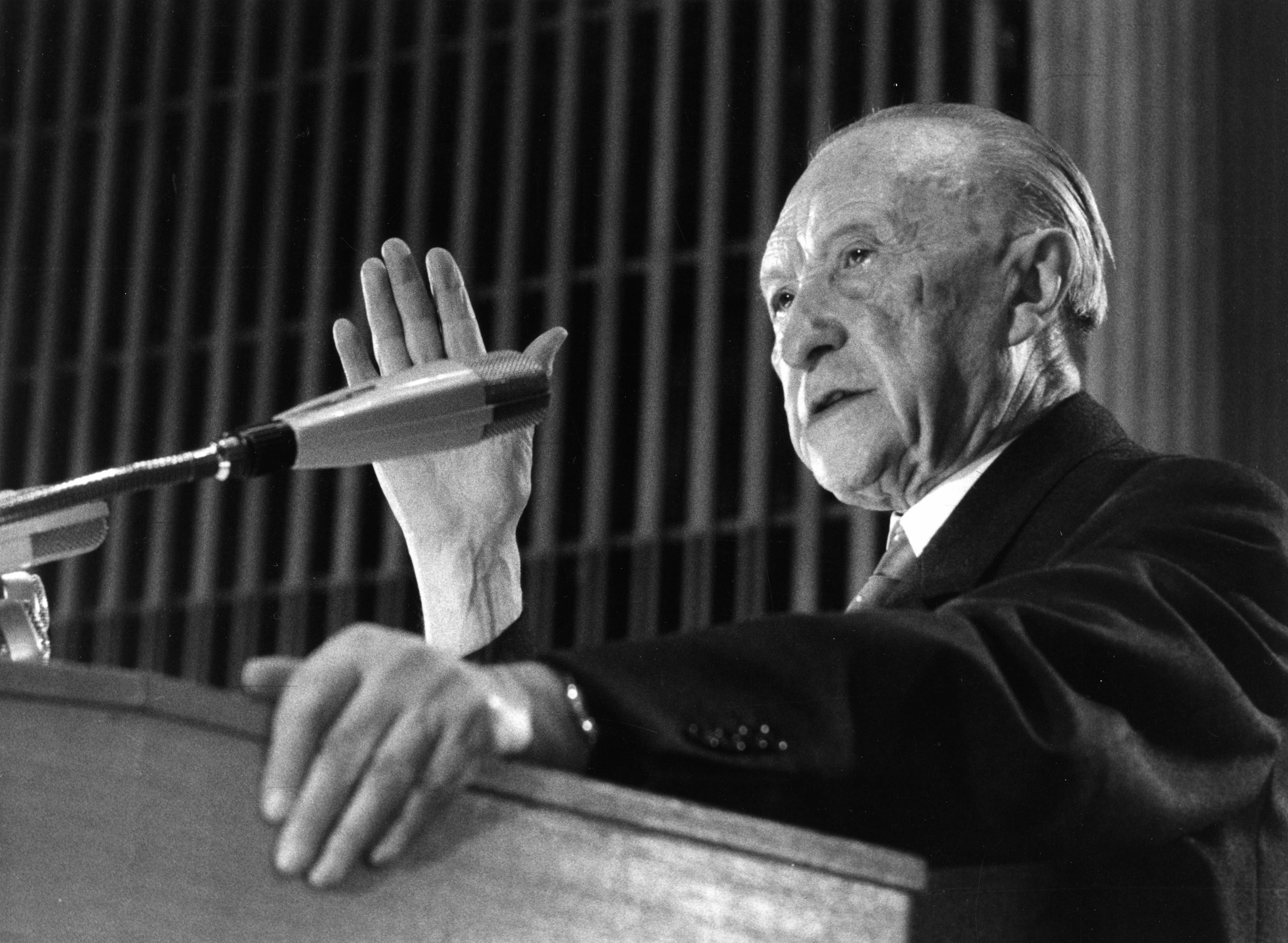 Adenauer, Konrad14. CDU-Bundesparteitag, 21.03.1966 - 23.03.1966